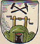 Herb wsi Ciechanowice, gmina Marciszów.